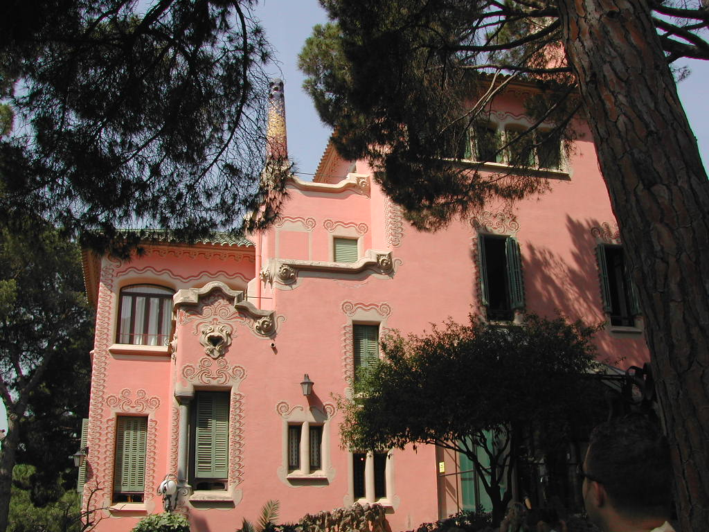 Parc Güell - Dem Gaudí säin Haus